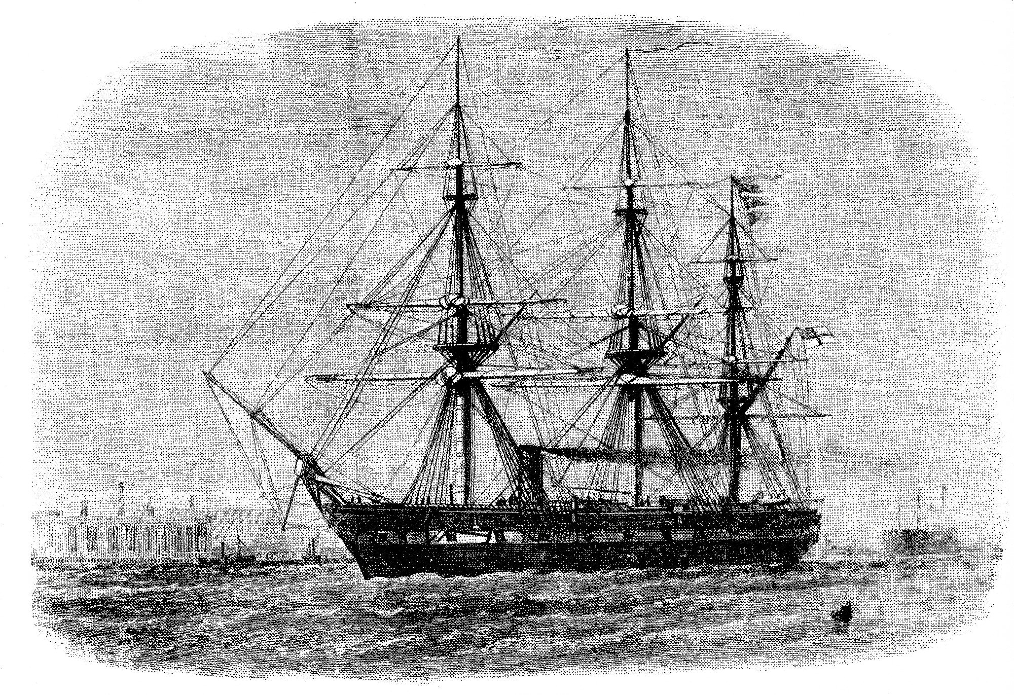 HMS Challenger (launched 1858)